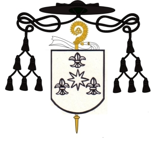 Wappen Bernard Reyder, 1652 - 1717, Abt von Münsterschwarzach (1704-1717)